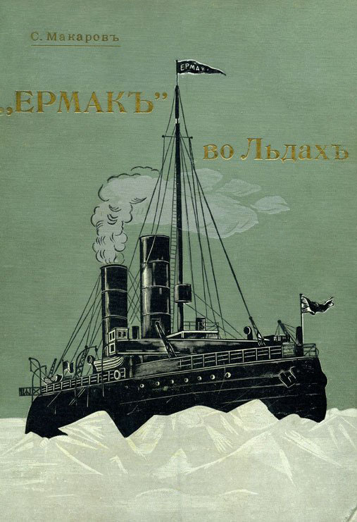 Обложка книги Степан Осипович Макаров «Ермак во льдах», 1901 г.